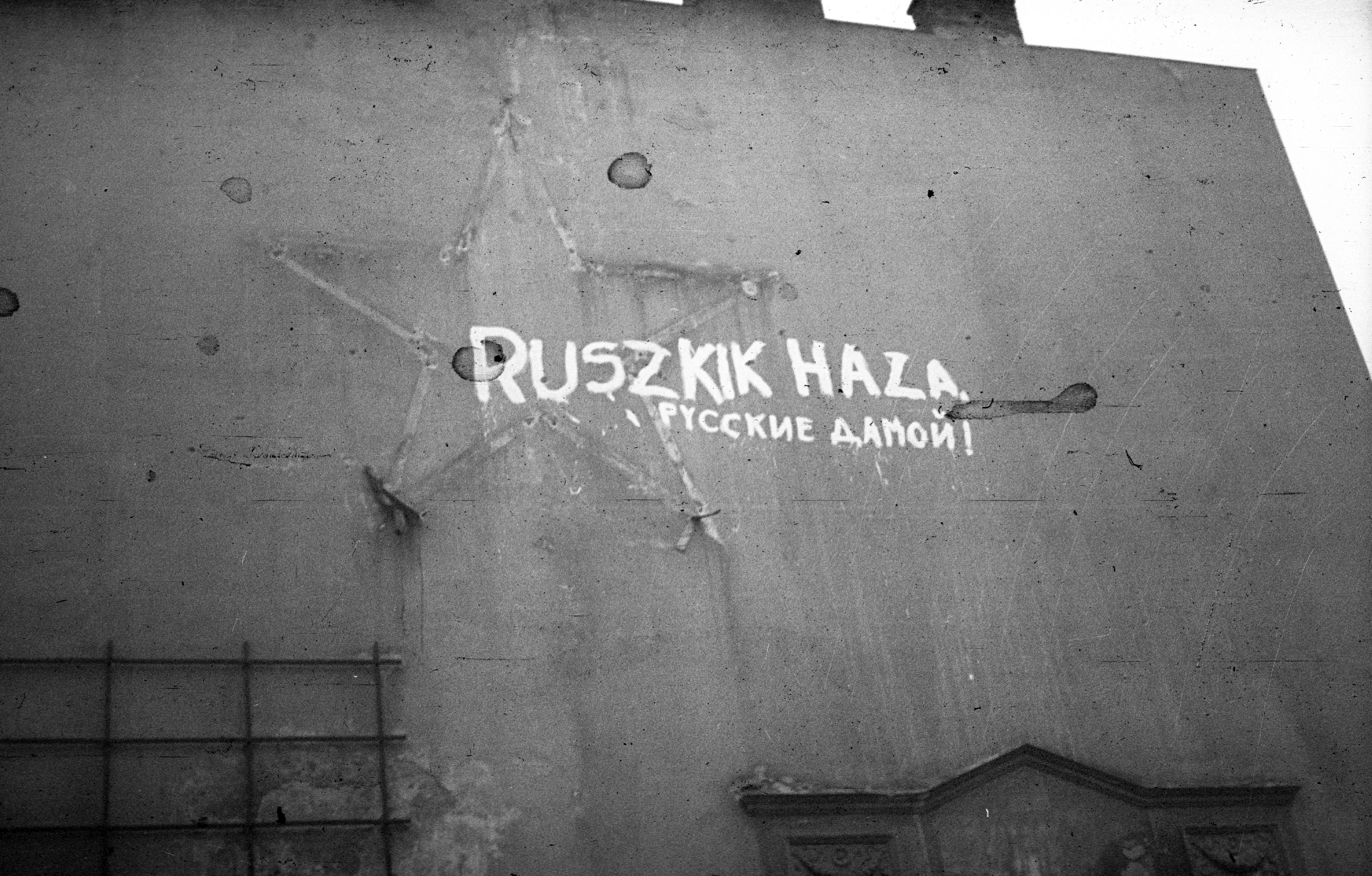 Kálvin téri tűzfal 1956-ban. Location: Hungary, Budapest VIII. Tags: revolution, label, Red Star, Budapest Title: Kálvin téri tűzfal 1956-ban.